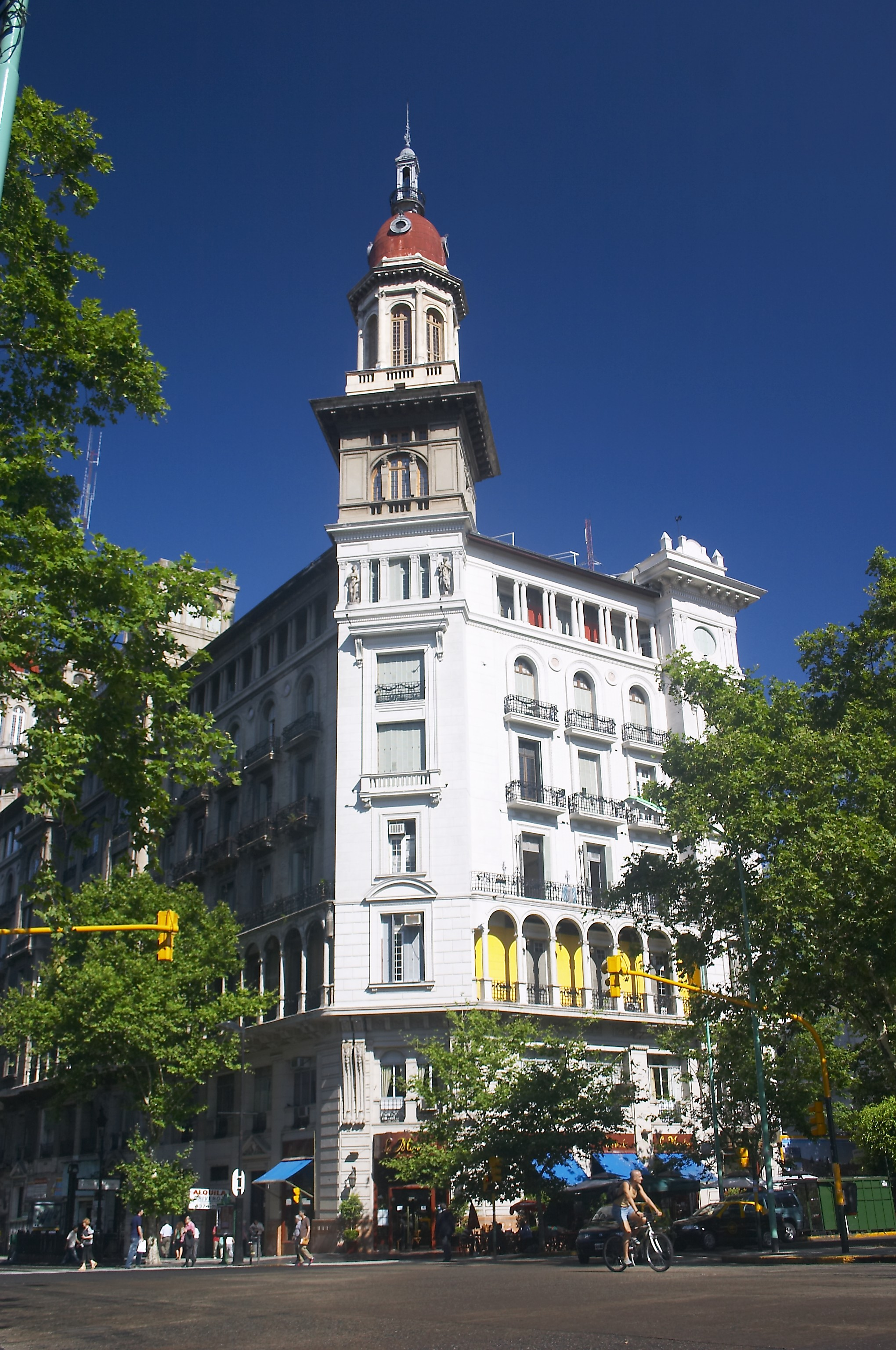 Edificio La Inmobiliaria, construido por el arquitecto Broggi hacia el año 1910, Avenida de Mayo y Sáenz Peña, Buenos Aires, Argentina.